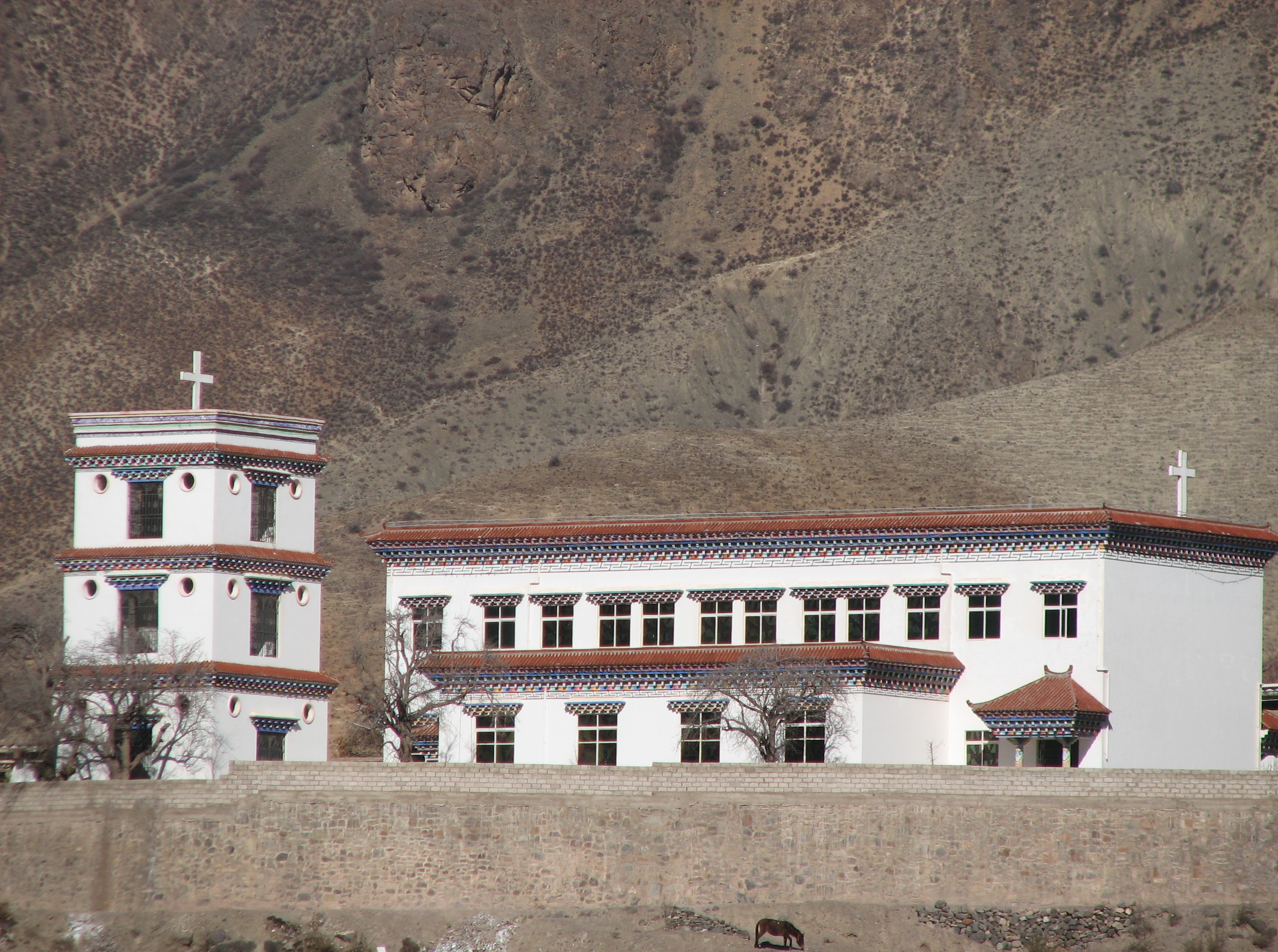 Eglise catholique de Tsakalo au Tibet (Yerkalo, tsha kha lho, Tsakhalo, Tshwa Kha Lho, Yanjing)